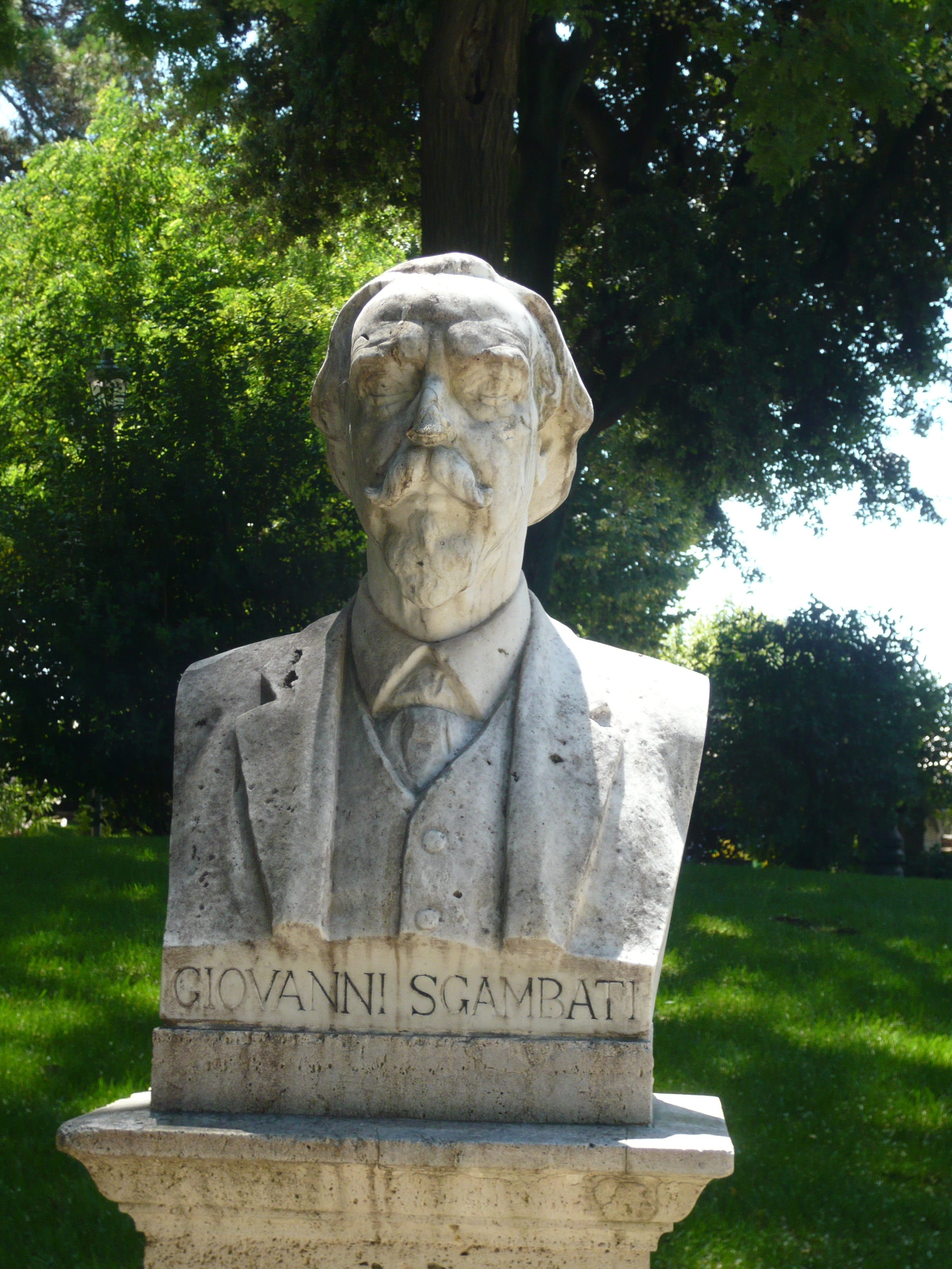 Buste de Giovanni Sgambati (parc pincio)